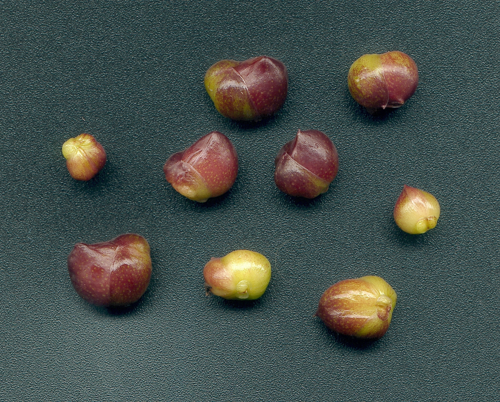 Lilium sulphureum Bulbils